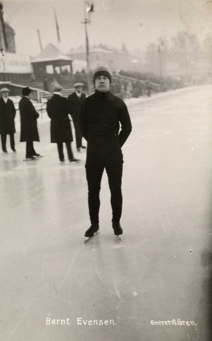 Norwegian speedskater Bernt Evensen at Frogner stadion in Oslo, Norway